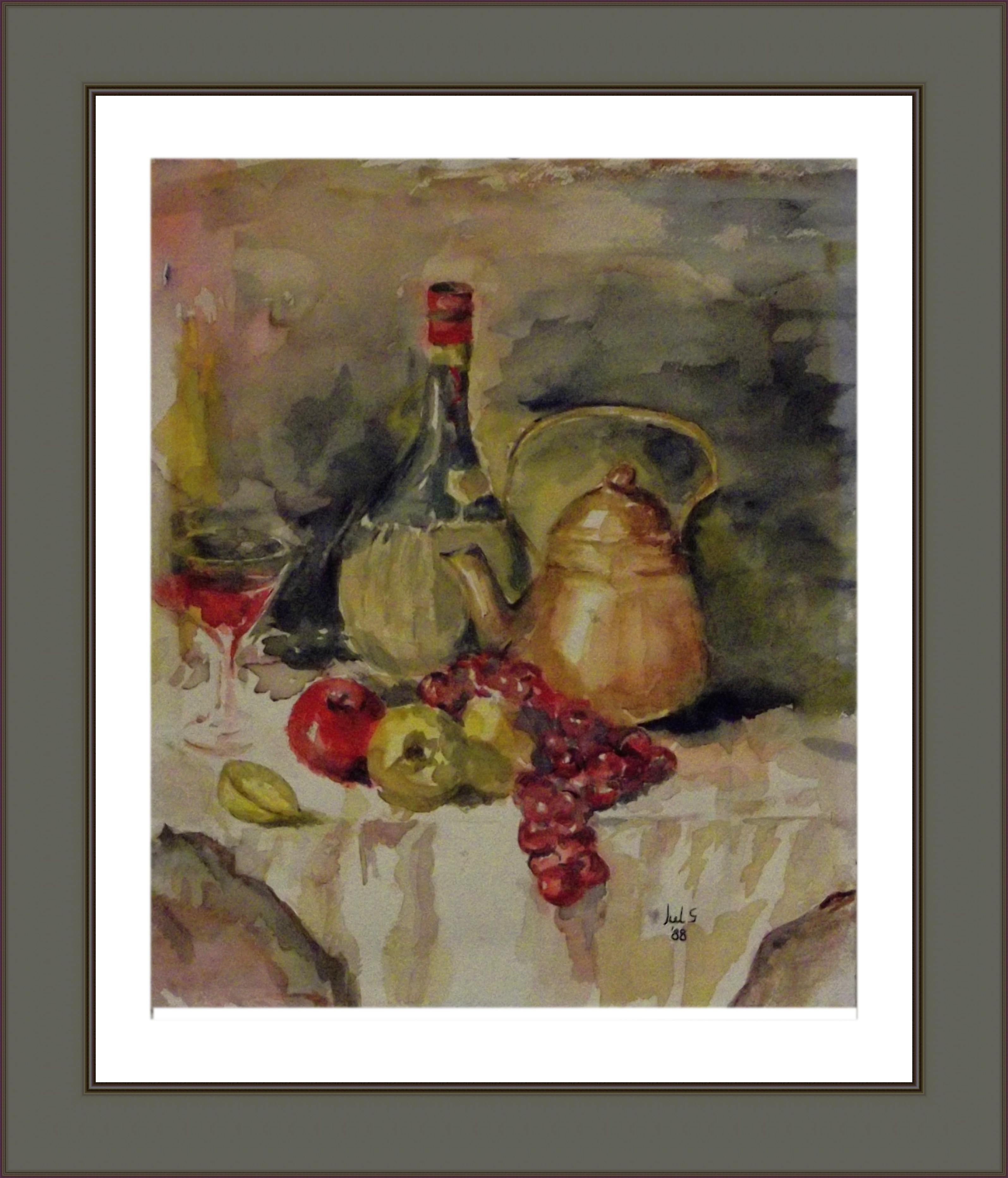 Stilleven in rood groen en koper-Julien Grandgagnage, 1988 Aquarel